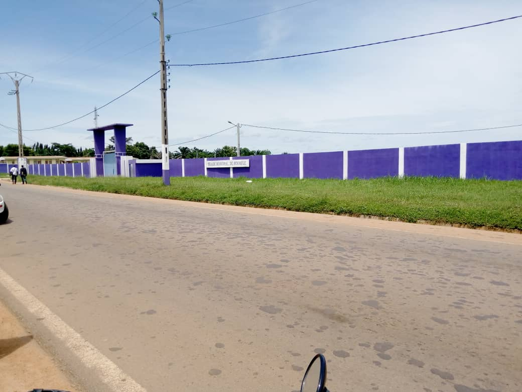 La clôture du stade municipal